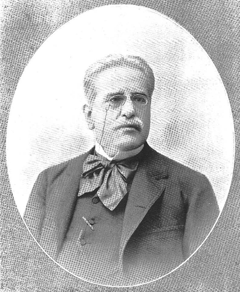 Retrato del Juan Valera y Alcalá Galiano, obra del fotógrafo Manuel Alviach, recogido en la revista española La Ilustración Española y Americana.